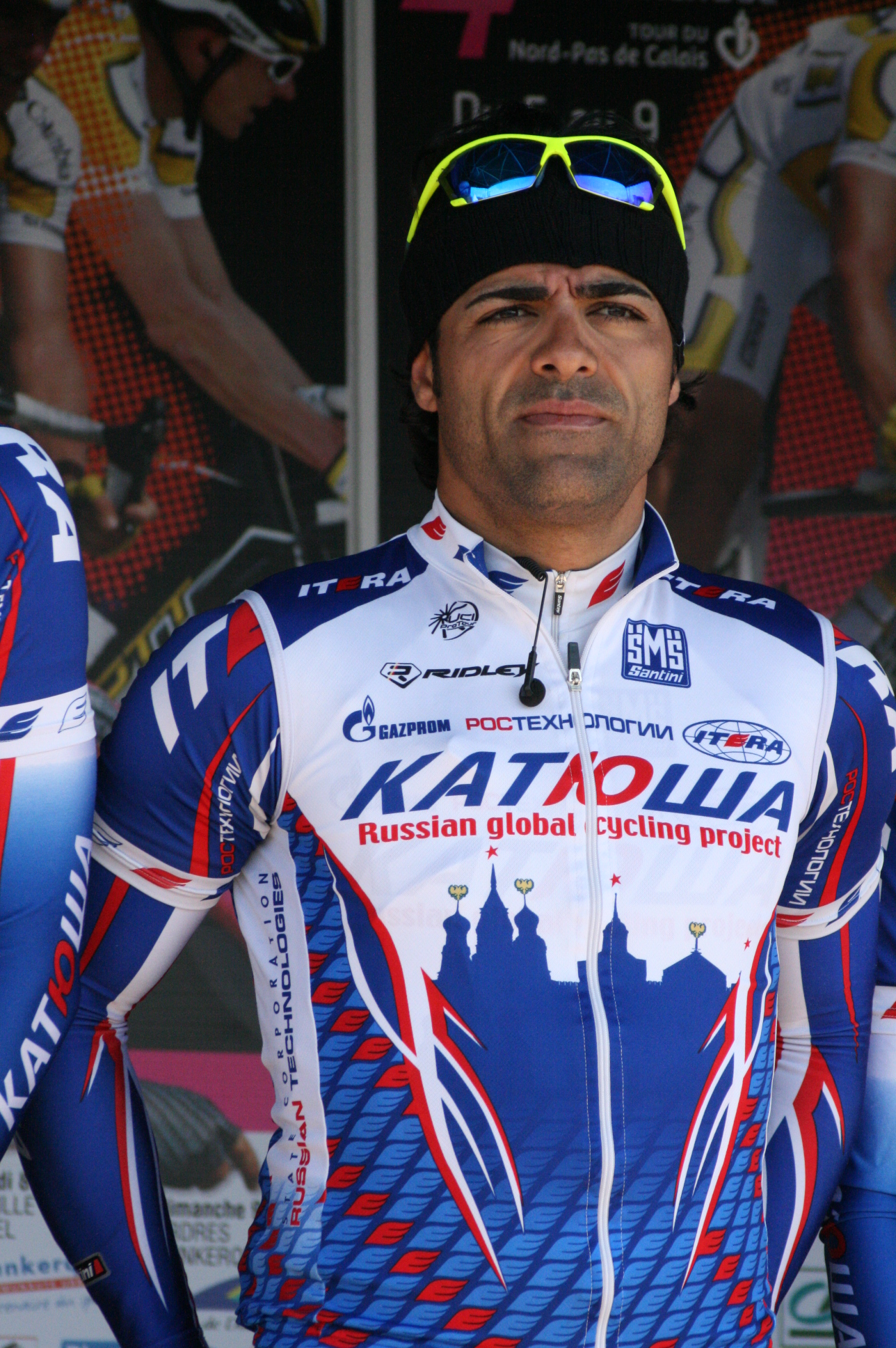 Danilo Napolitano lors de la présentation des équipes des 4 jours de Dunkerque